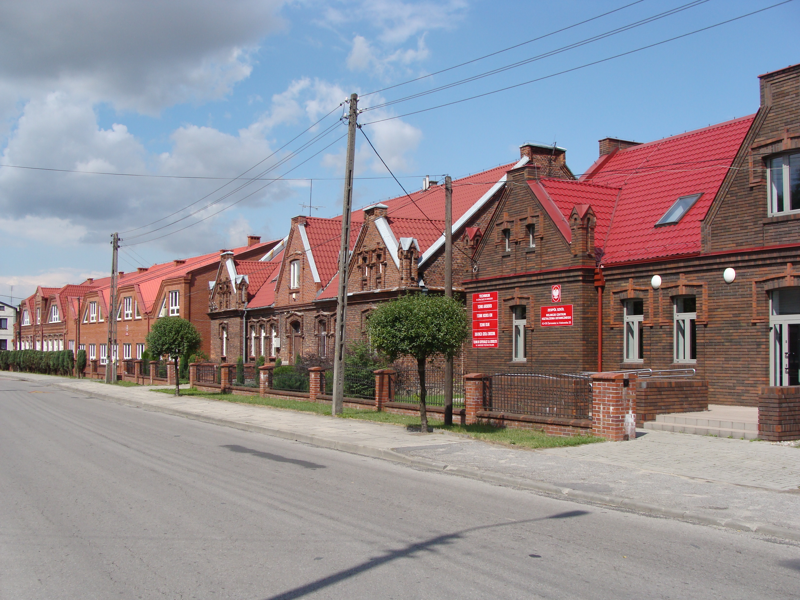 Ulica Krakowska Żarnowcu Od prawej: zespół szkół rolniczych, szkoła podstawowa, gimnazjum